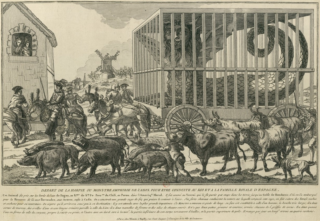 Départ de la harpie ou monstre amphibie de Cadix pour être conduite au roi et à la famille royale d'Espagne, eau-forte, 32 x 46 cm.